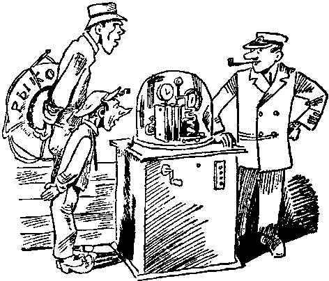 Шарж на Хармса и Олейникова